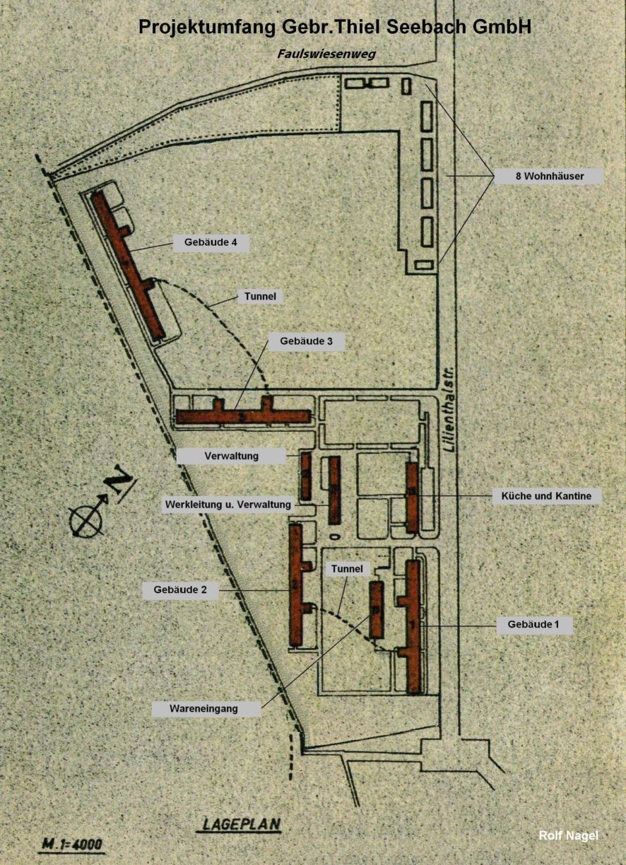 Lageplan des Werksgeländes der Fa. Gerätebau GmbH (Gebr.Thiel Seebach)in Kassel/Hessen/Deutschland. Stand 1939